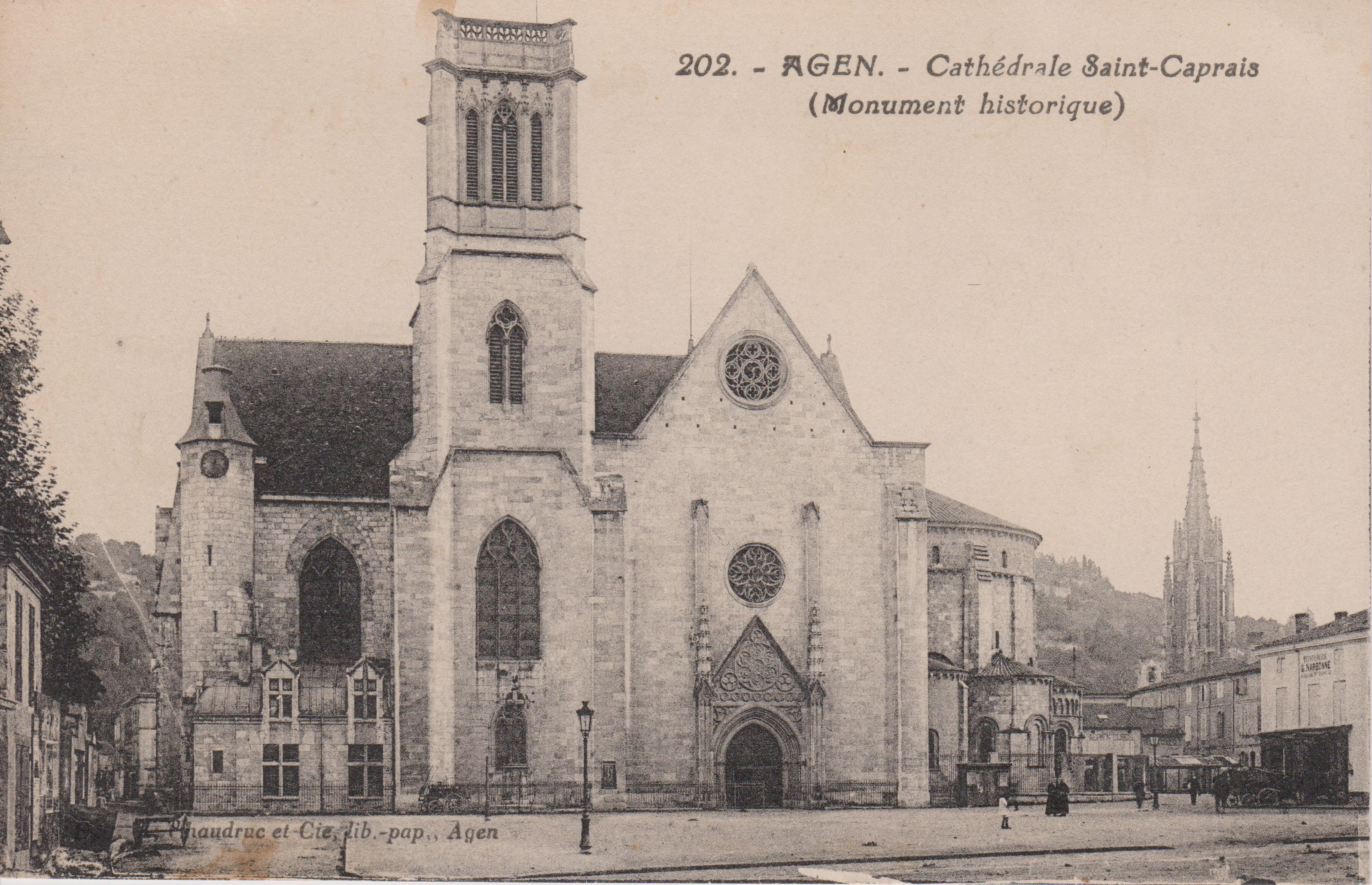 La cathédrale Saint-Caprais à Agen.